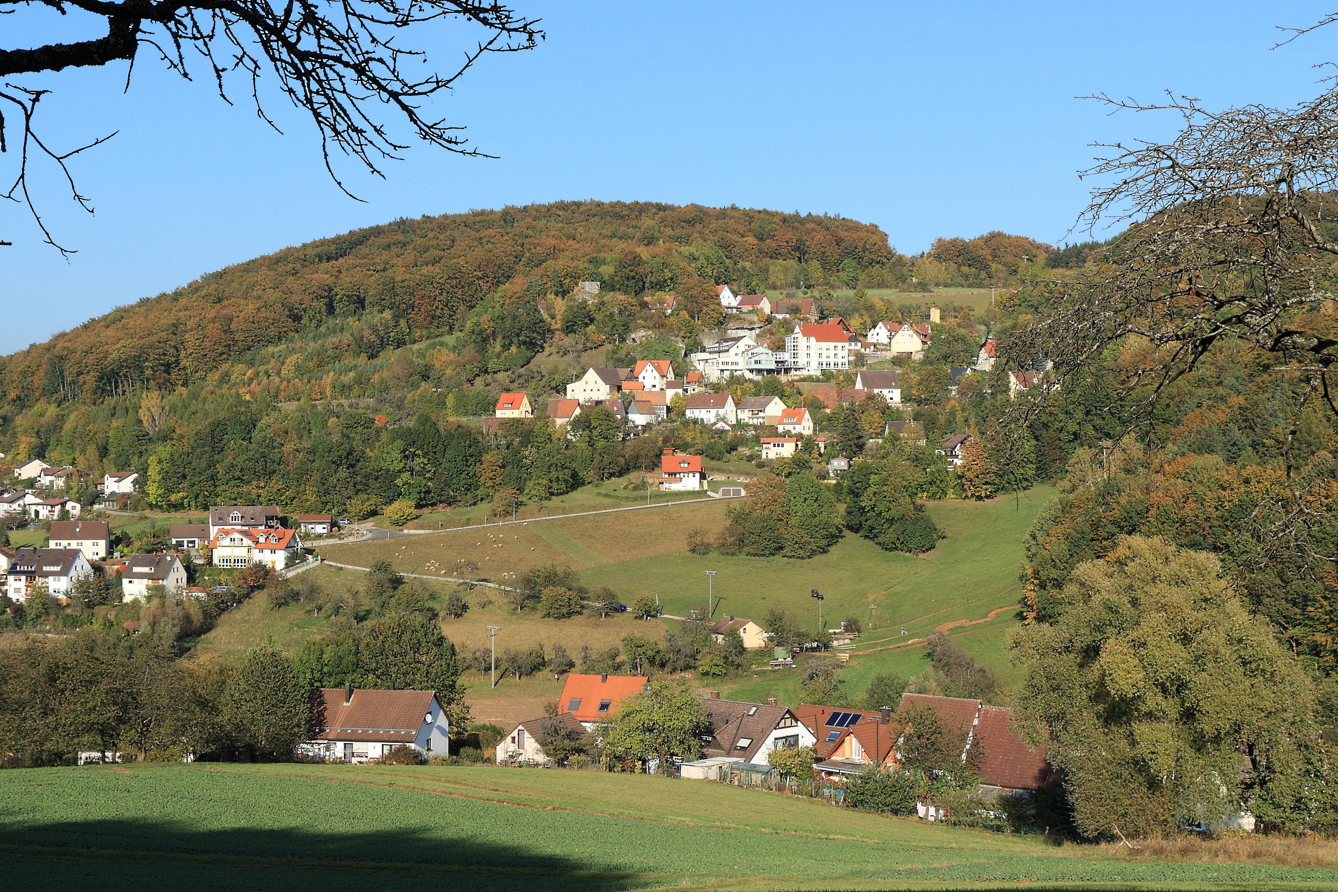 Ansicht von Osternohe mit der Burgruine von Südwesten